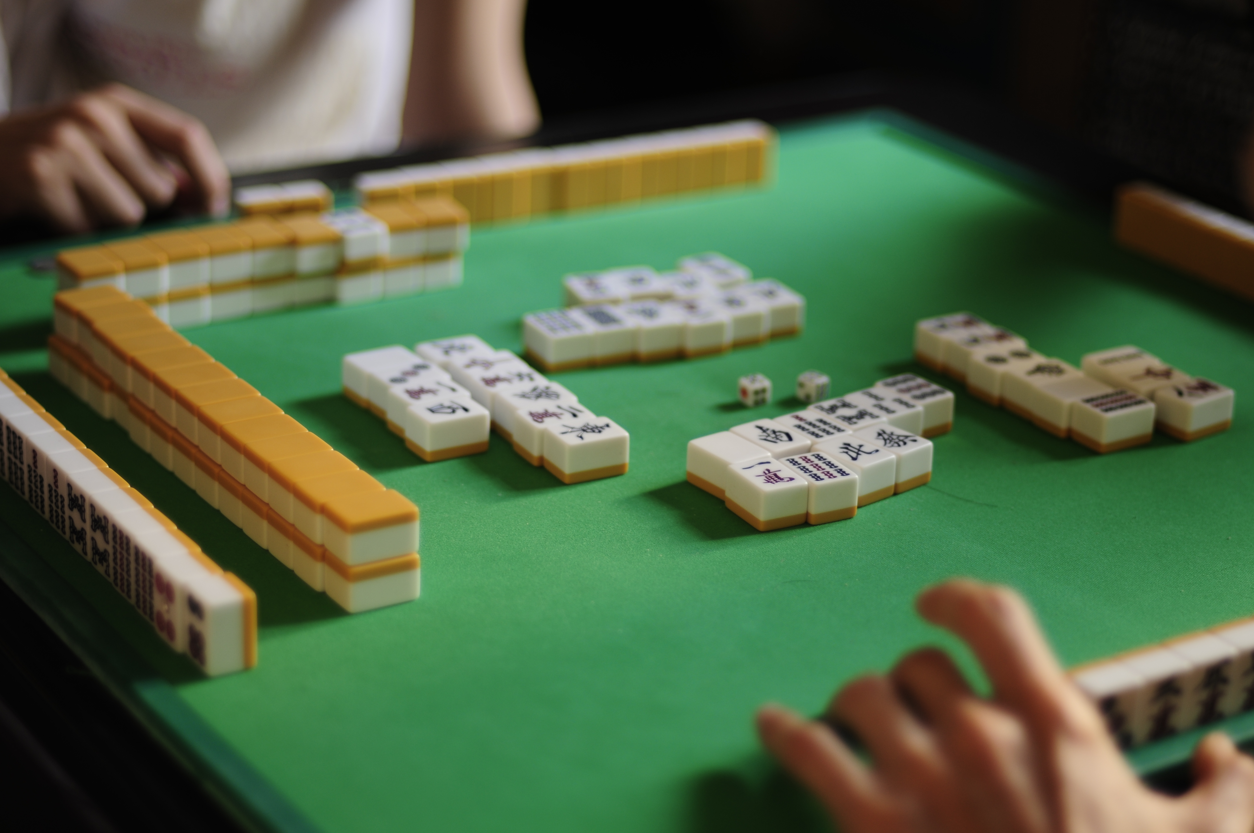 Playing mahjong